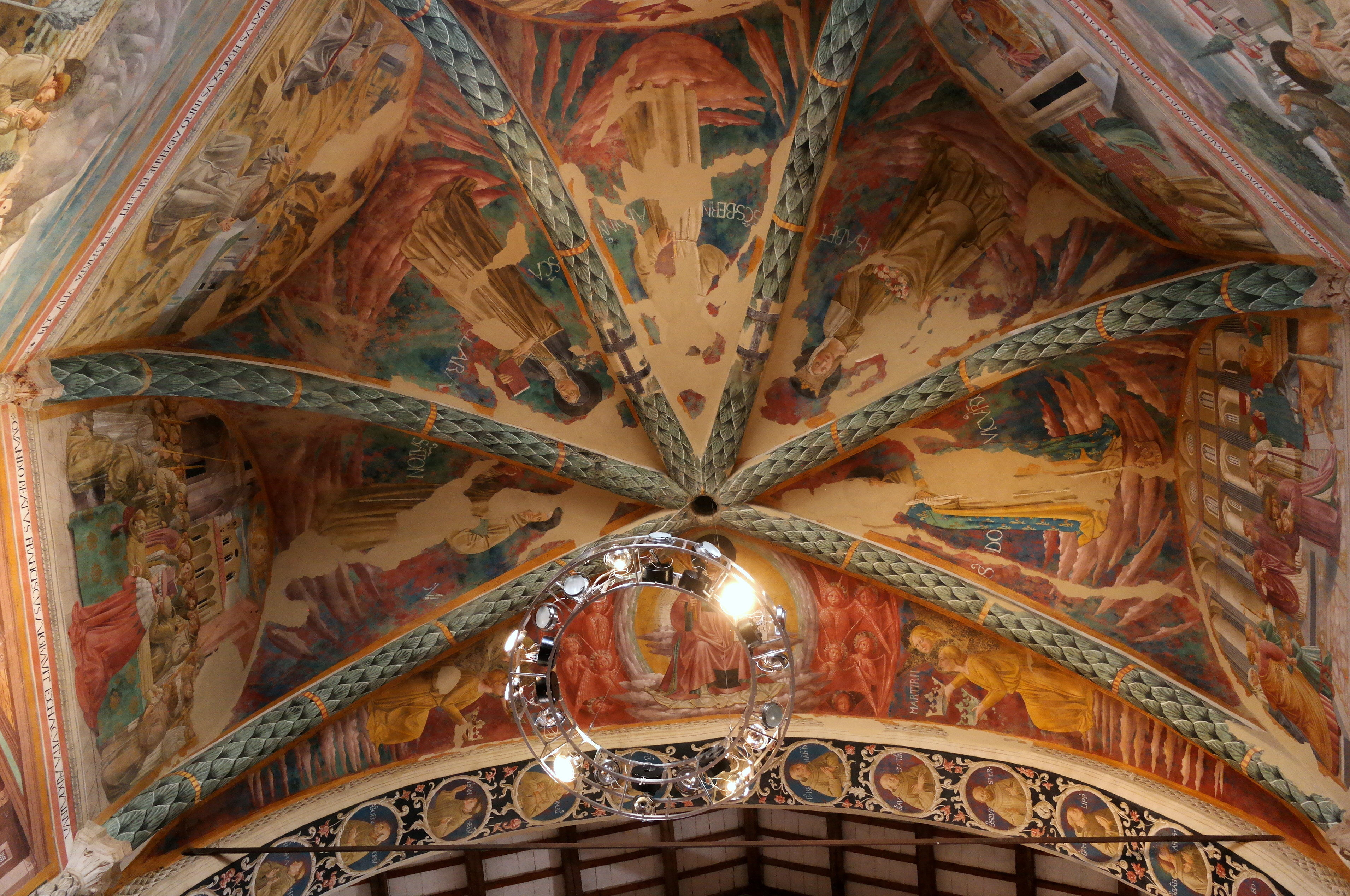 Scene della Vita di San Francesco, opera di Benozzo Gozzoli, nell'abside della Chiesa di San Francesco a Montefalco